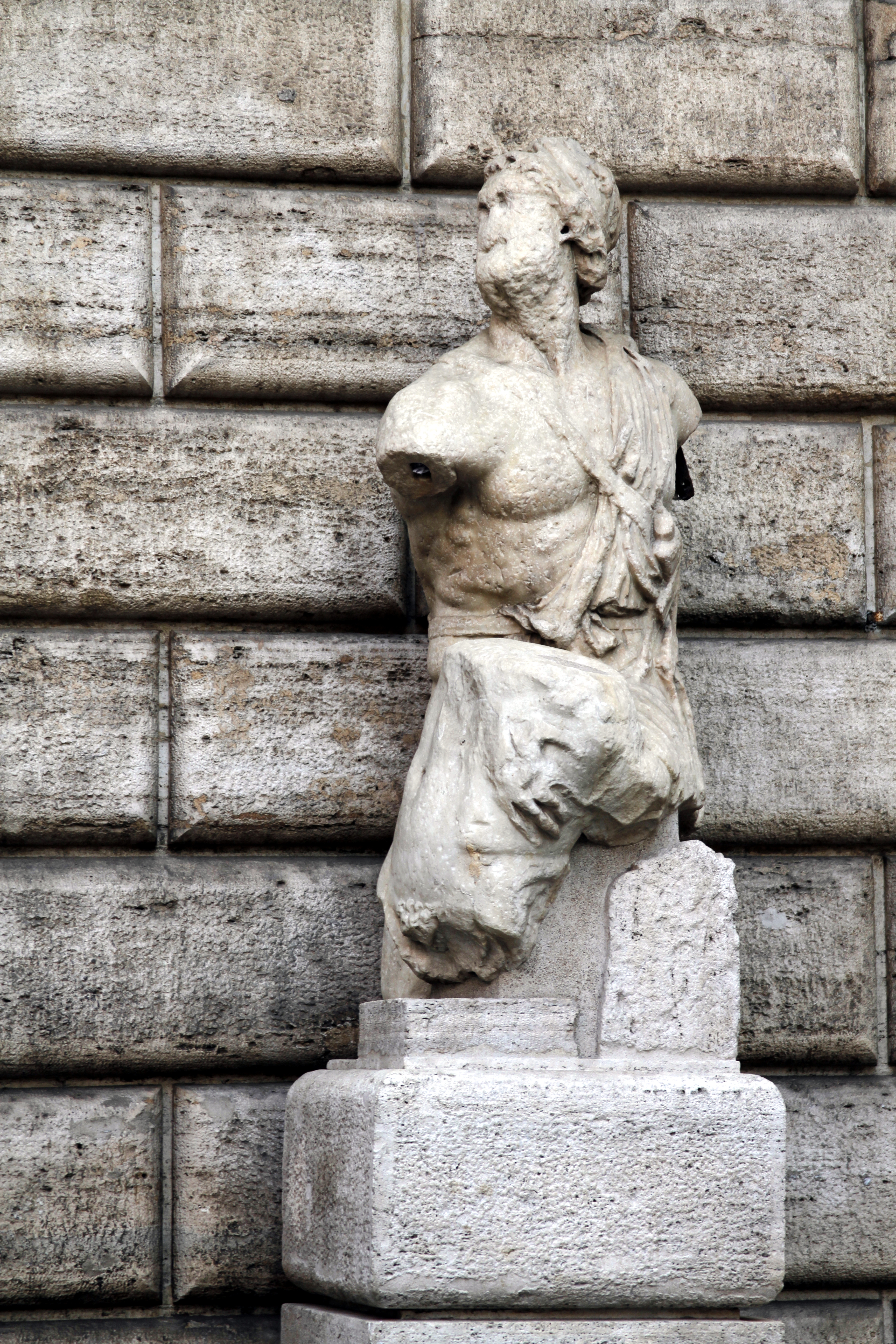 Pasquino - Rome